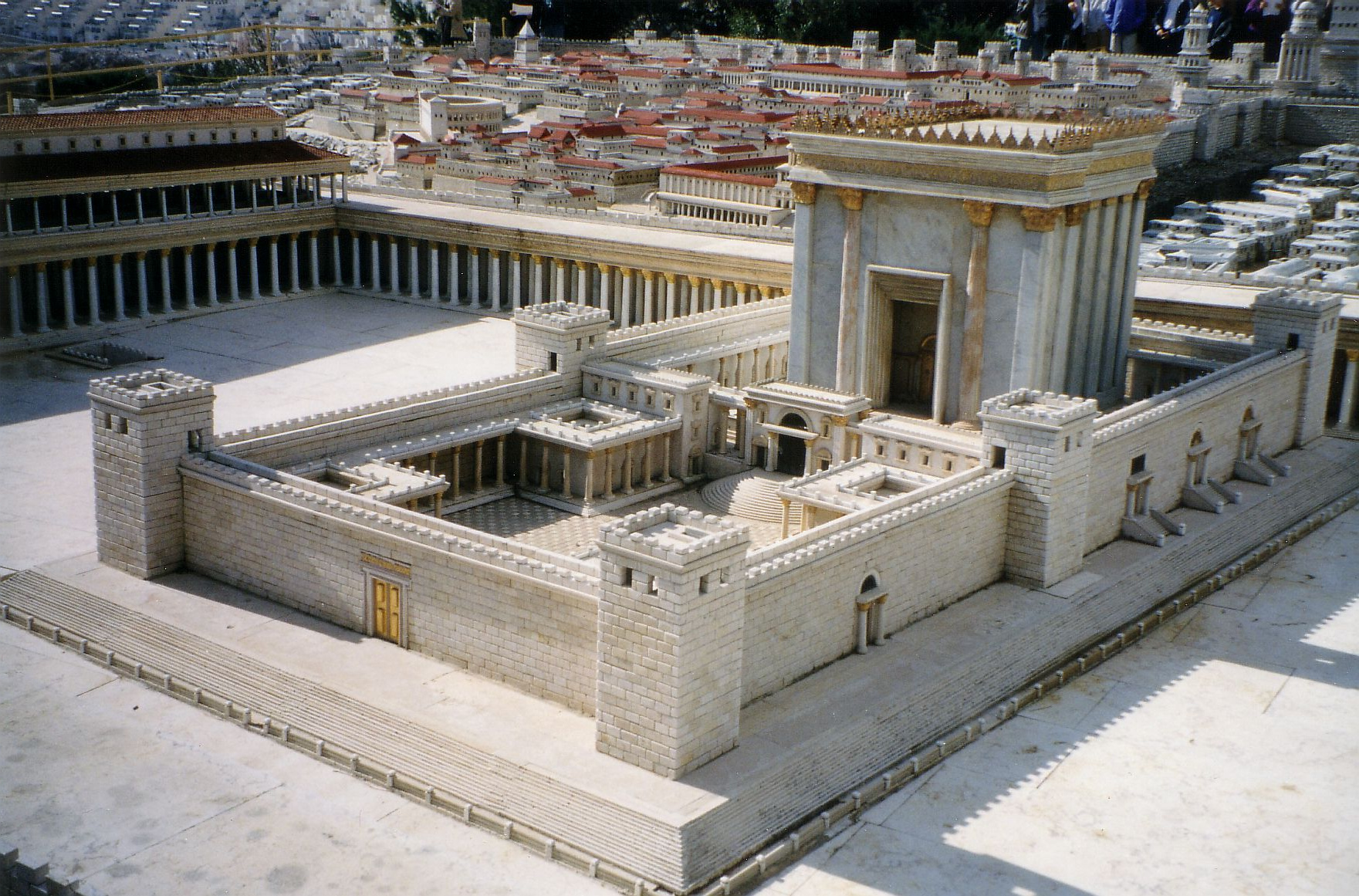 Close up of the temple in the Holyland Model of JerusalemFotografía del Templo de Jerusalén en la maqueta del Jerusalén bíblico del jardín del Hotel Holyland en Jerusalén